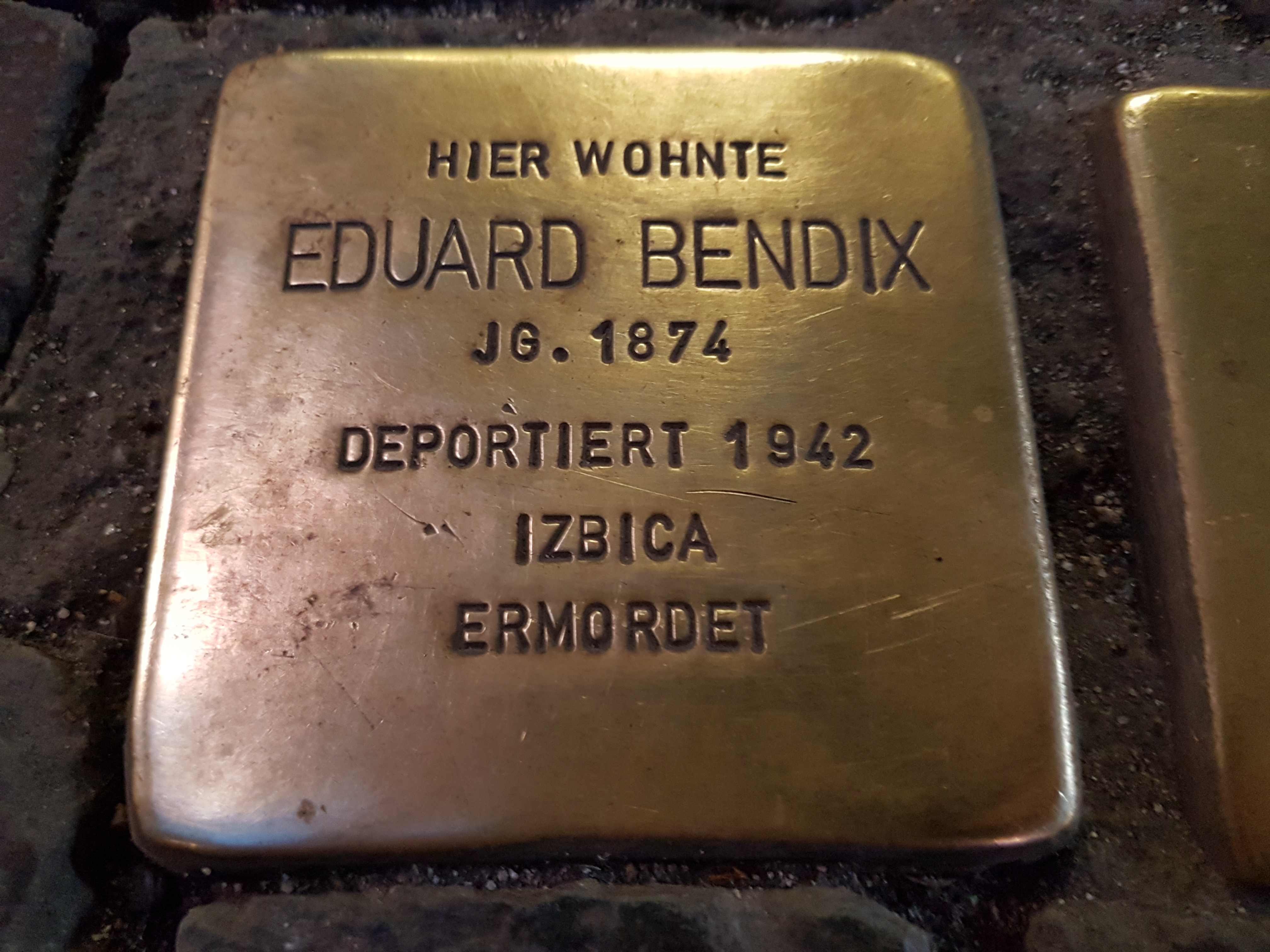 Stolperstein Duisburg Eduard Bendix